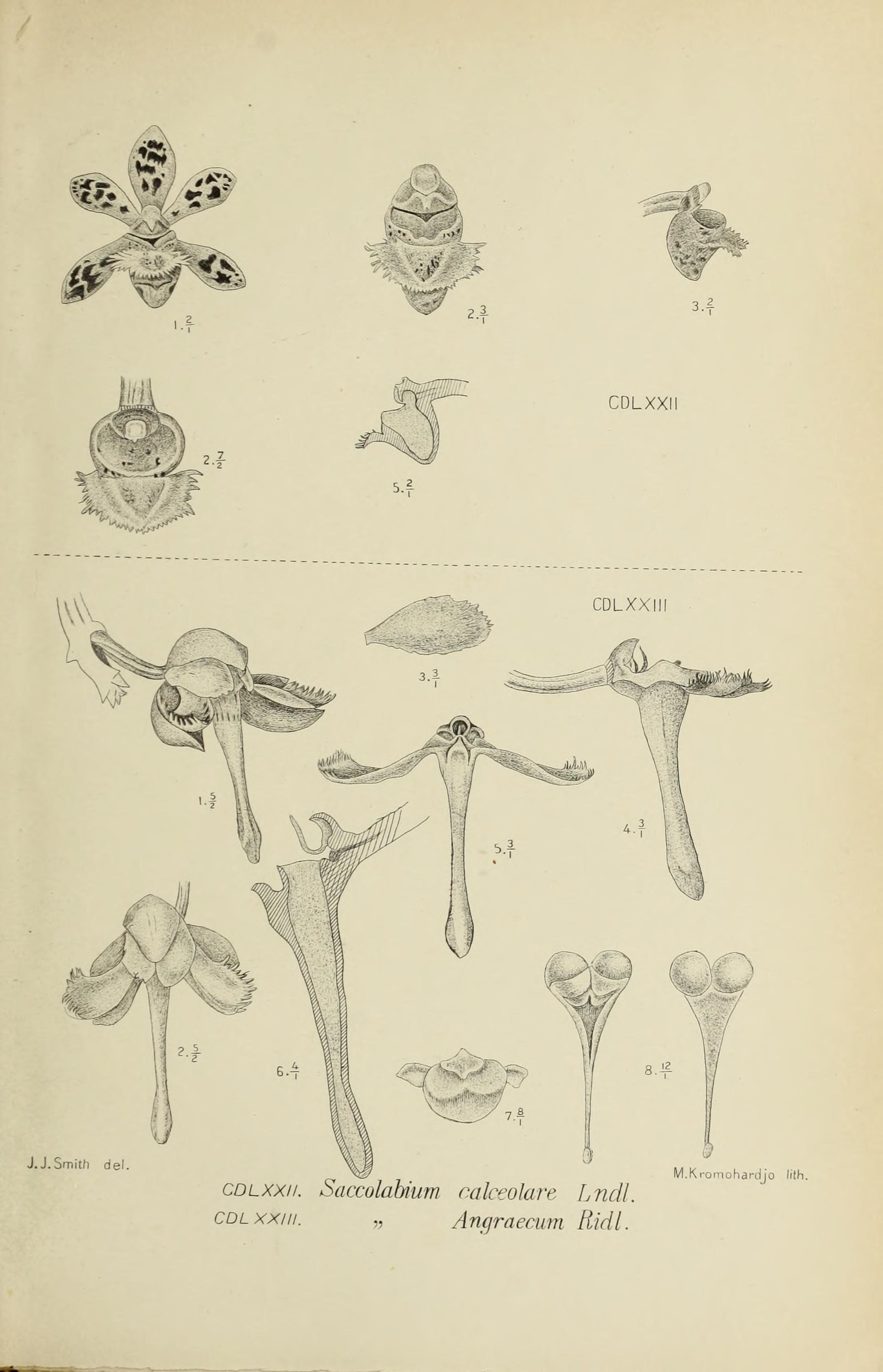 Die orchideen von Java /